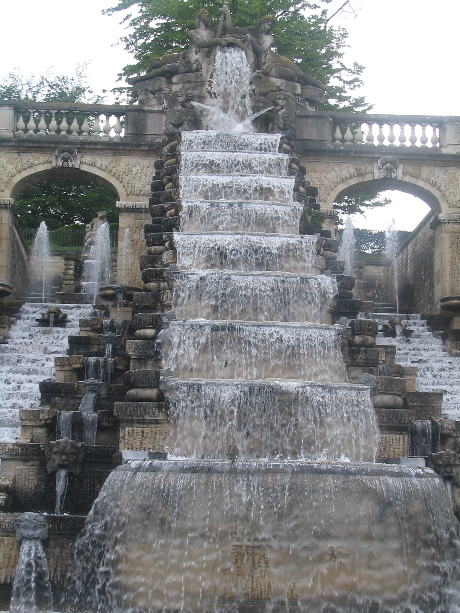 Parc de Saint-Cloud, France - Fontaine de Le Pautre (1660-1665)